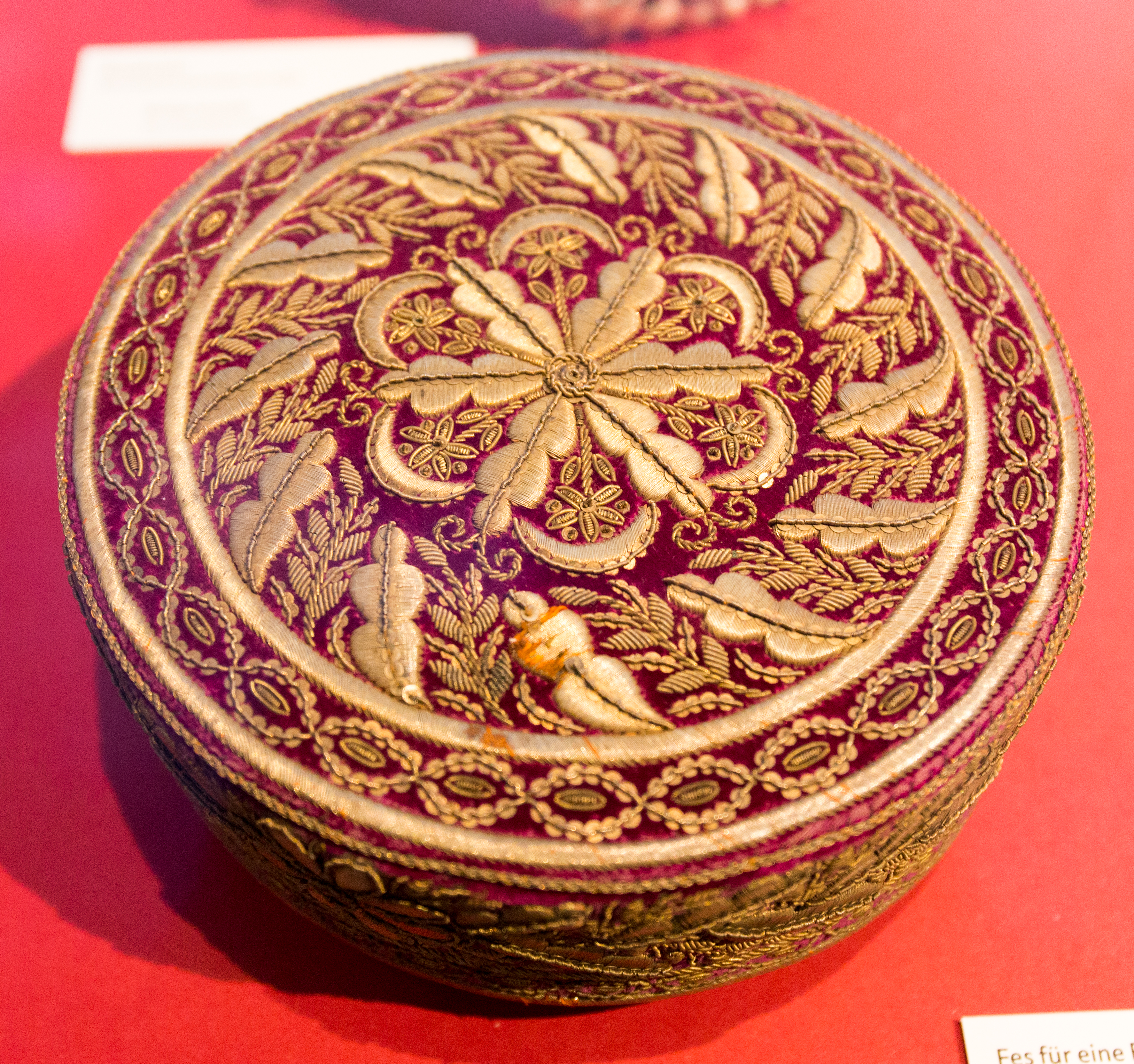 Fes für eine Braut Bachcisaraj/Krim 1. Hälfte 19. Jahrhundert Sonderausstellung Traumhochzeiten im MEK